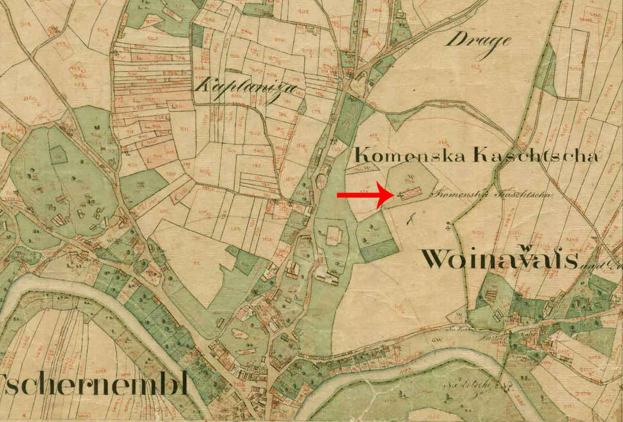 Franciscejski kataster za Kranjsko, 1823-1869